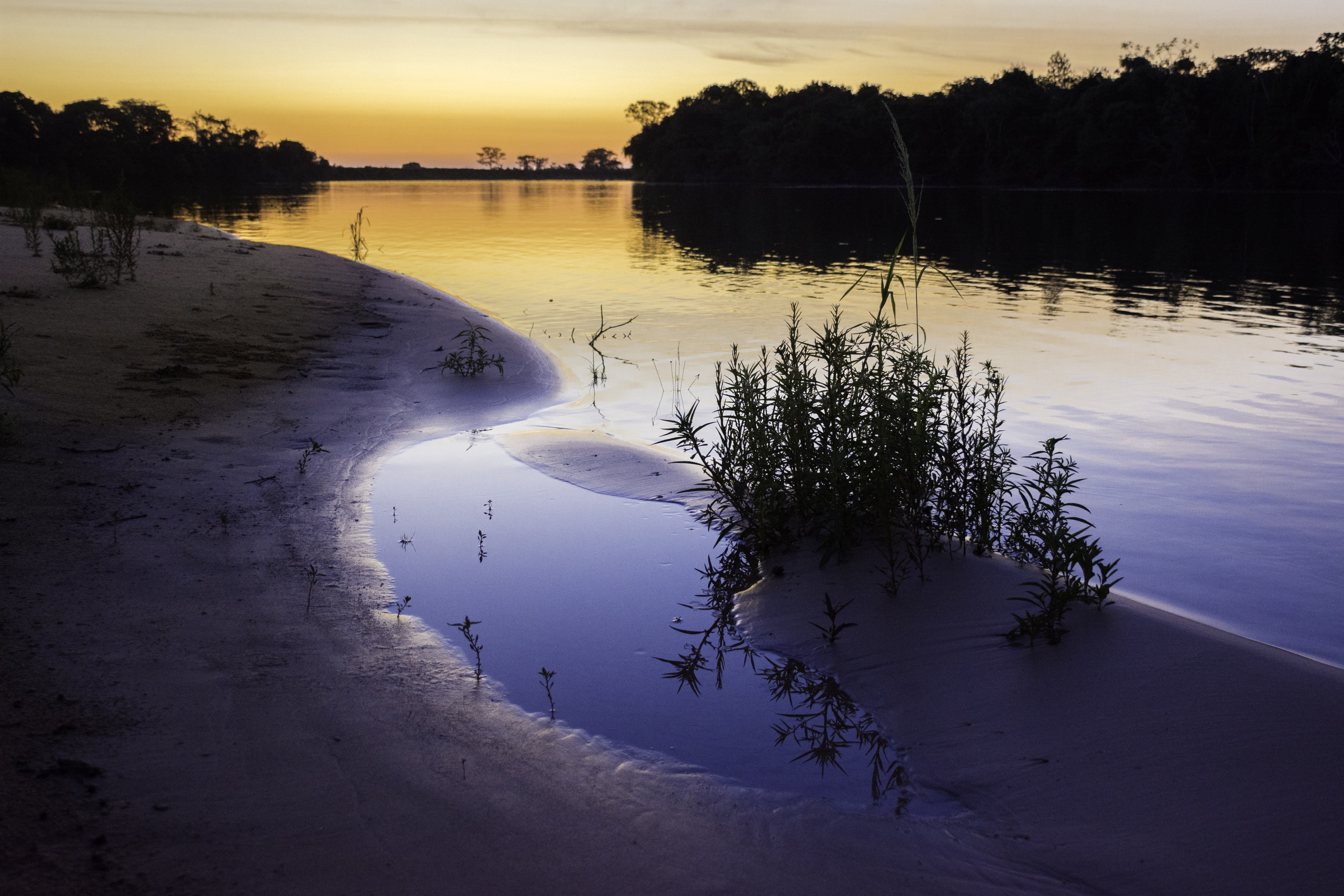 Por do sol no Porto Jofre, Pantanal.